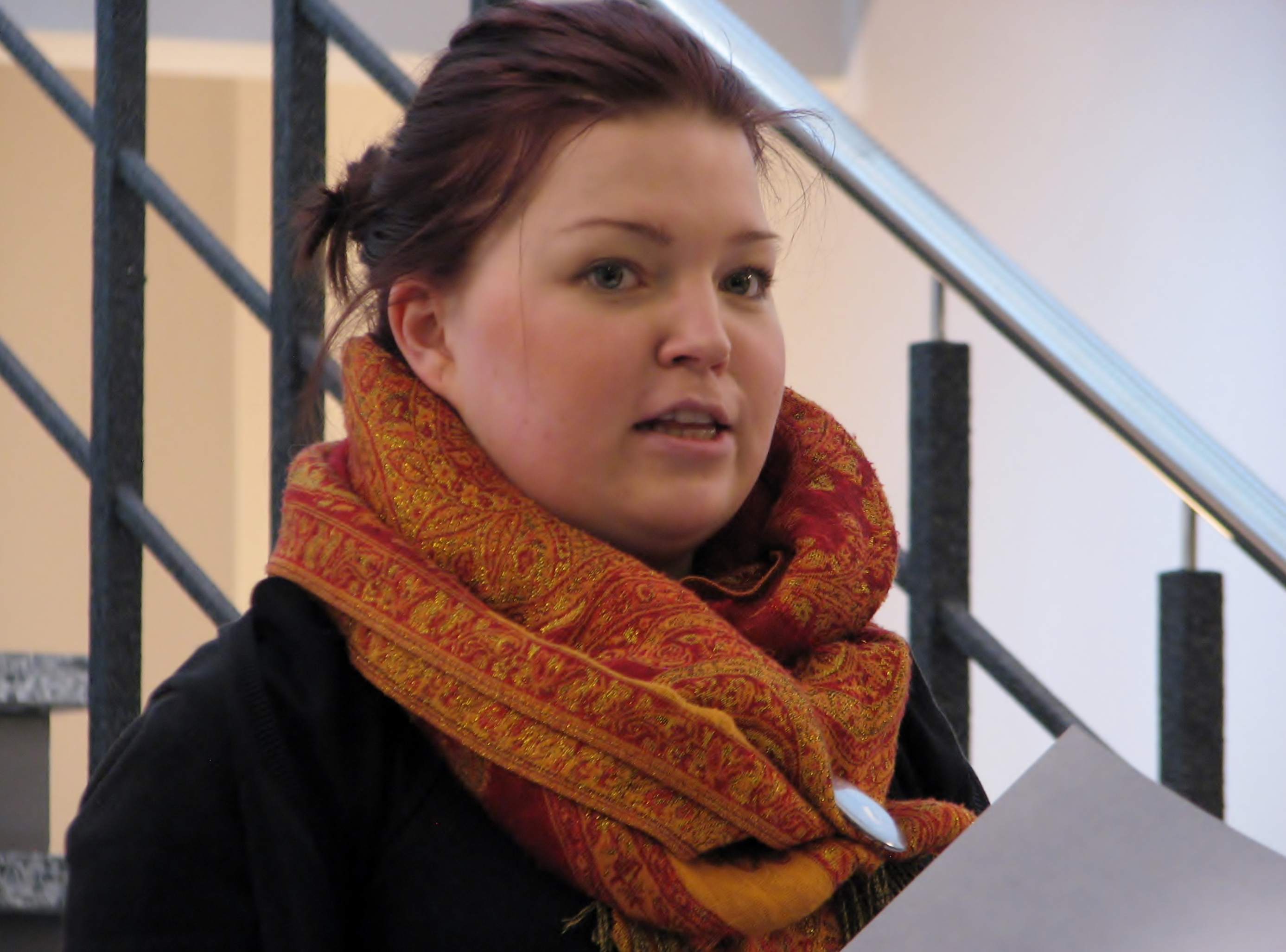 Mari Tammar esinemas rahvusvahelise luulepäeva luulemaratonil Tallinna Keskraamatukogus 21. märtsil 2014